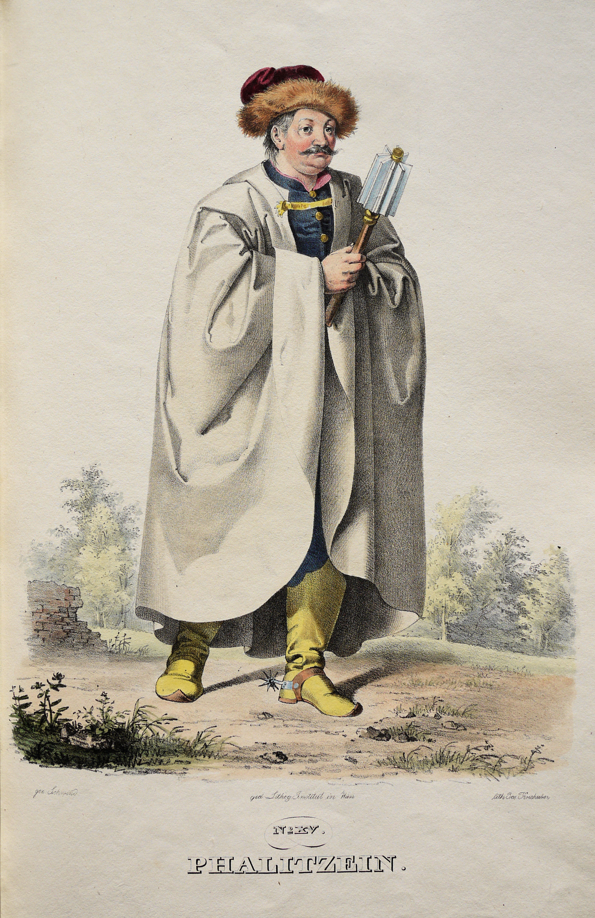 Fajsz, um 950 ungarischer Großfürst aus dem Hause der Arpaden. Lithographie von Josef Kriehuber nach einer Zeichnung von Moritz von Schwind aus Ungerns Erste Heerführer Herzoge und Koenige In einer Reihe von Bildnissen von Bela bis auf Seine Majestät Franz I. Kaiser Von Österreich König Von Ungern &c., &c. Wien : Lithographisches Institut ;ca. 1828